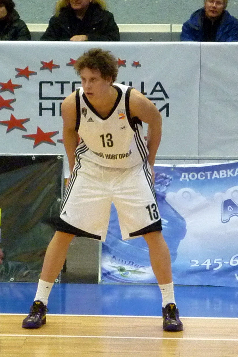 Защитник БК «Нижний Новгород» Дмитрий Кулагин в матче против красноярского Енисея 18 декабря 2010 года